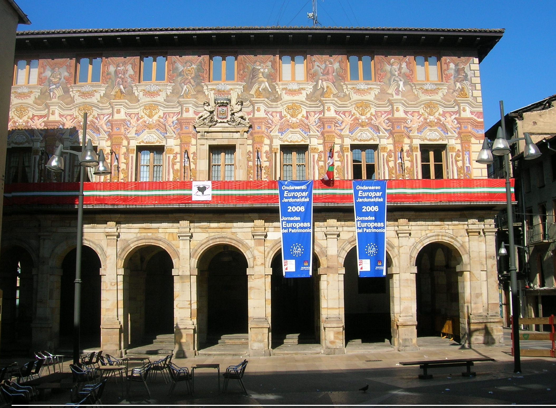 Ayuntamiento de Durango